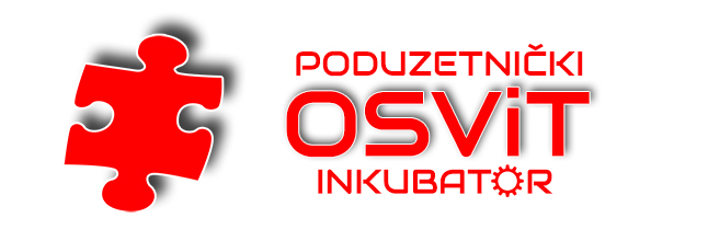 Logo Poduzetničkog inkubatora Osvit